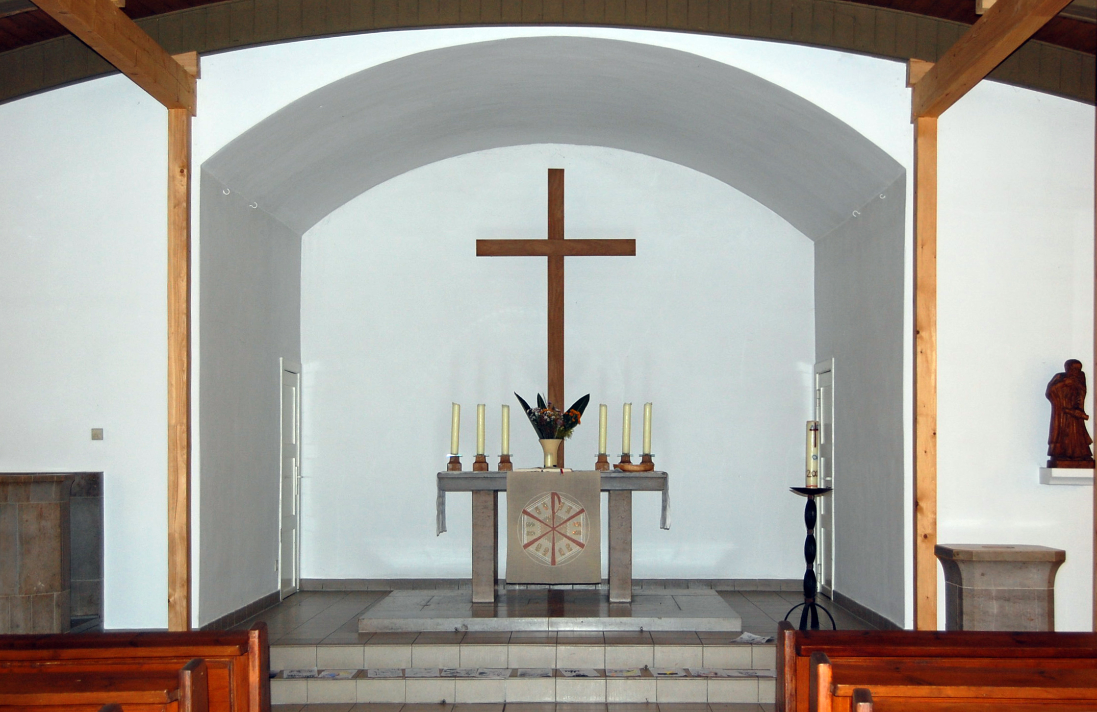 der Altar der Auferstehungskirche Kleinmachnow